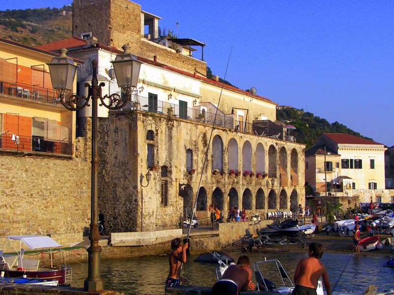 Immagine delle porte delle gatte